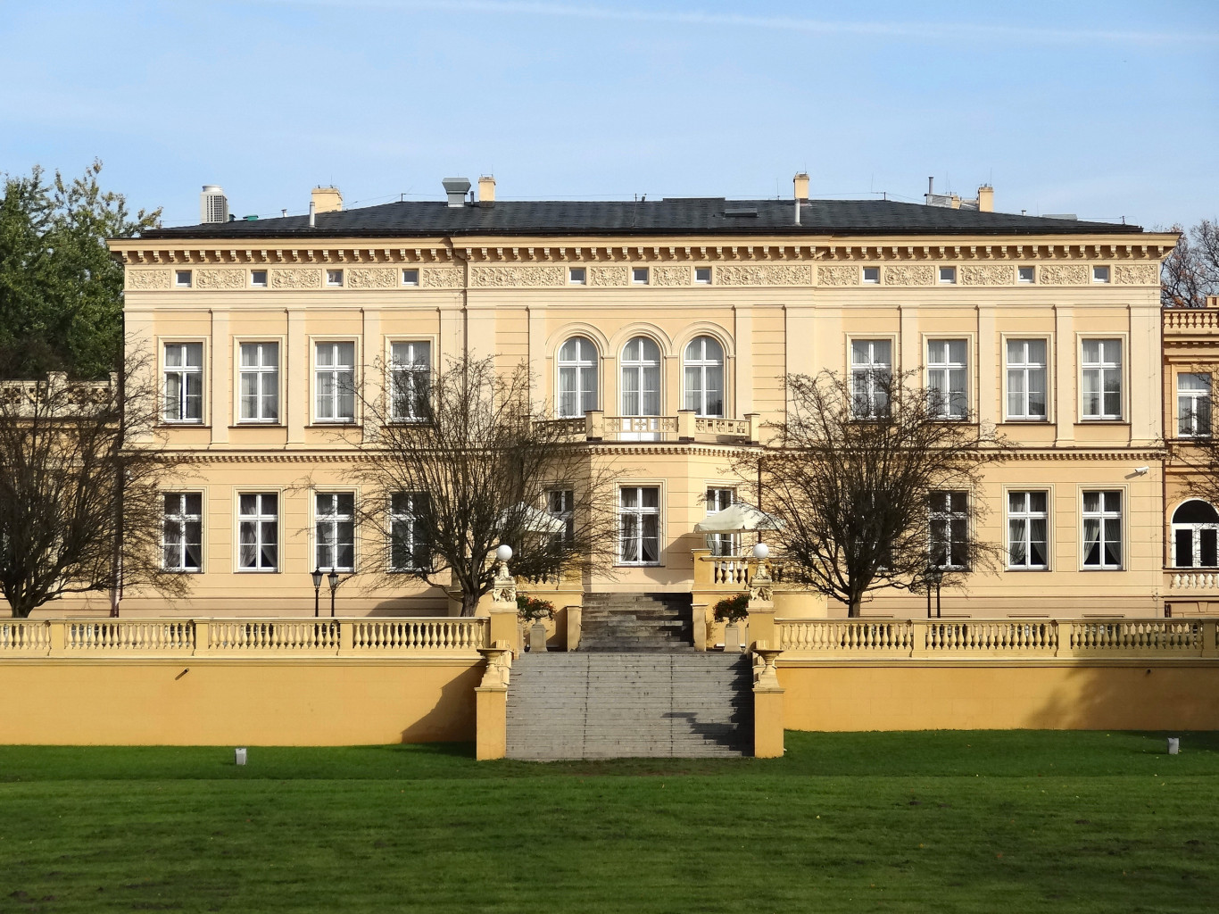 Ostromecko k. Bydgoszczy, pałac, tzw. Nowy, zbud. 1835-1848, 1891